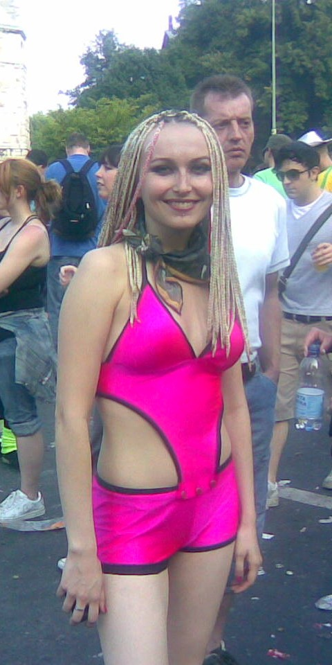 Love Parade 2007 in Essen